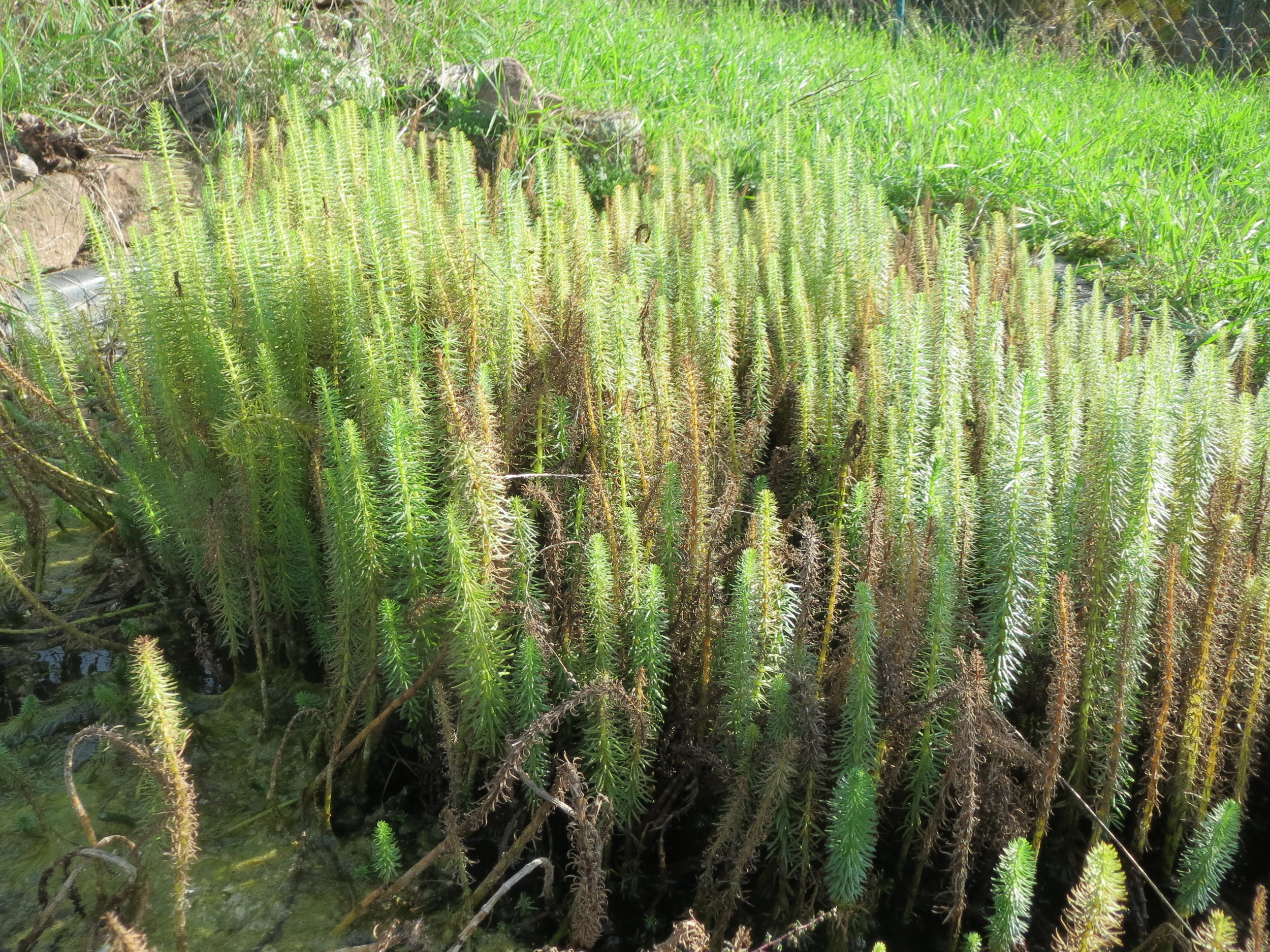 Tannenwedel (Hippuris vulgaris) bei Oftersheim